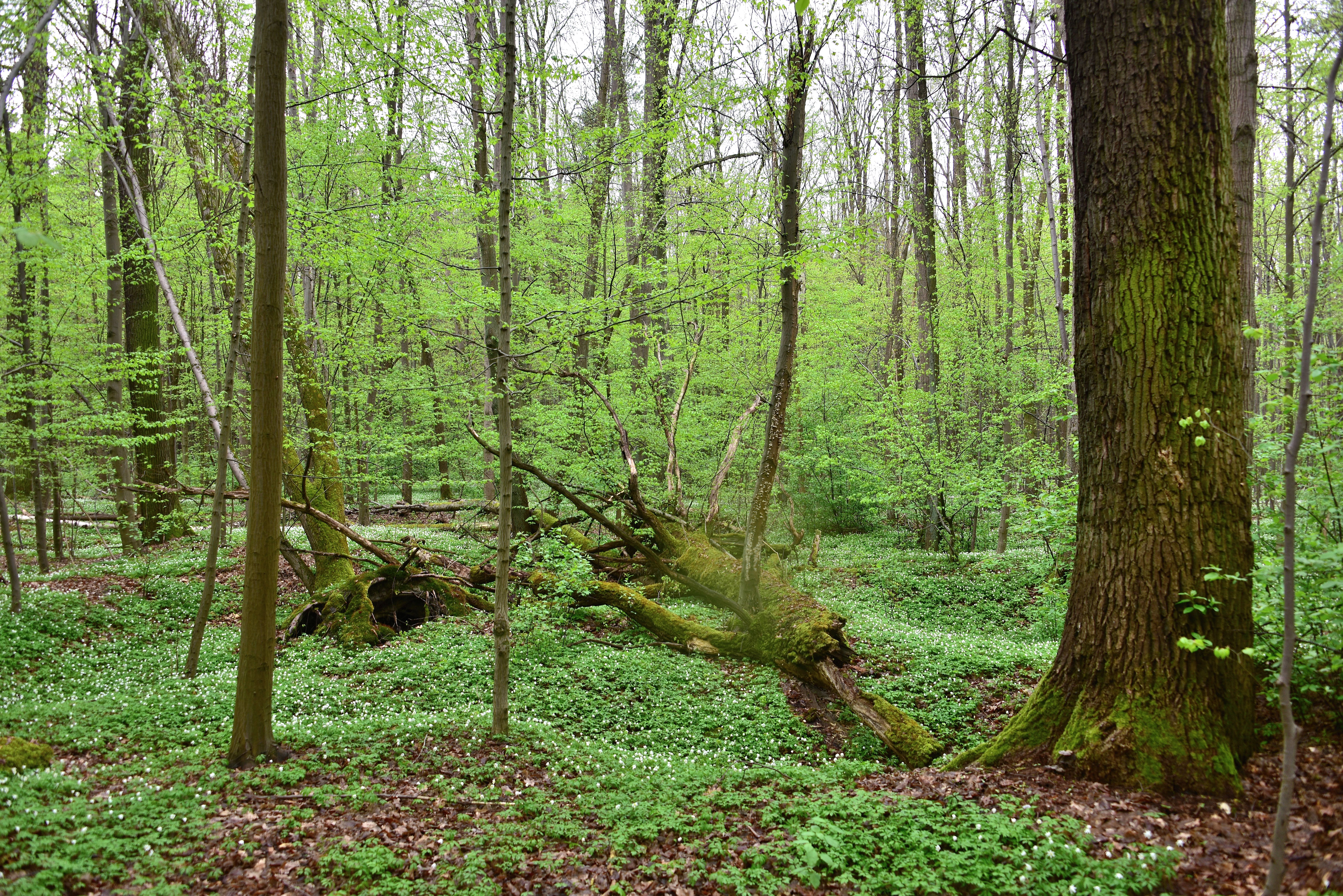 Rezerwat przyrody Kawęczyn w Warszawie Nature reserve Kawęczyn